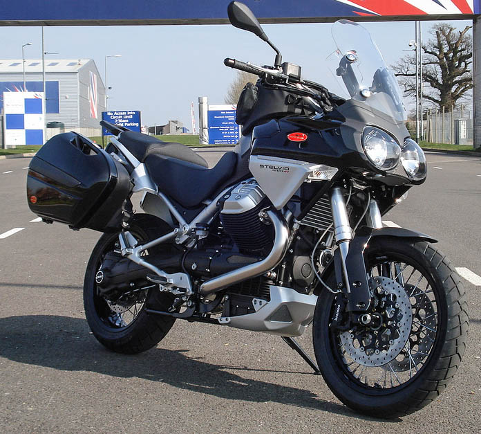 Moto Guzzi Stelvio 1200 motorcycle